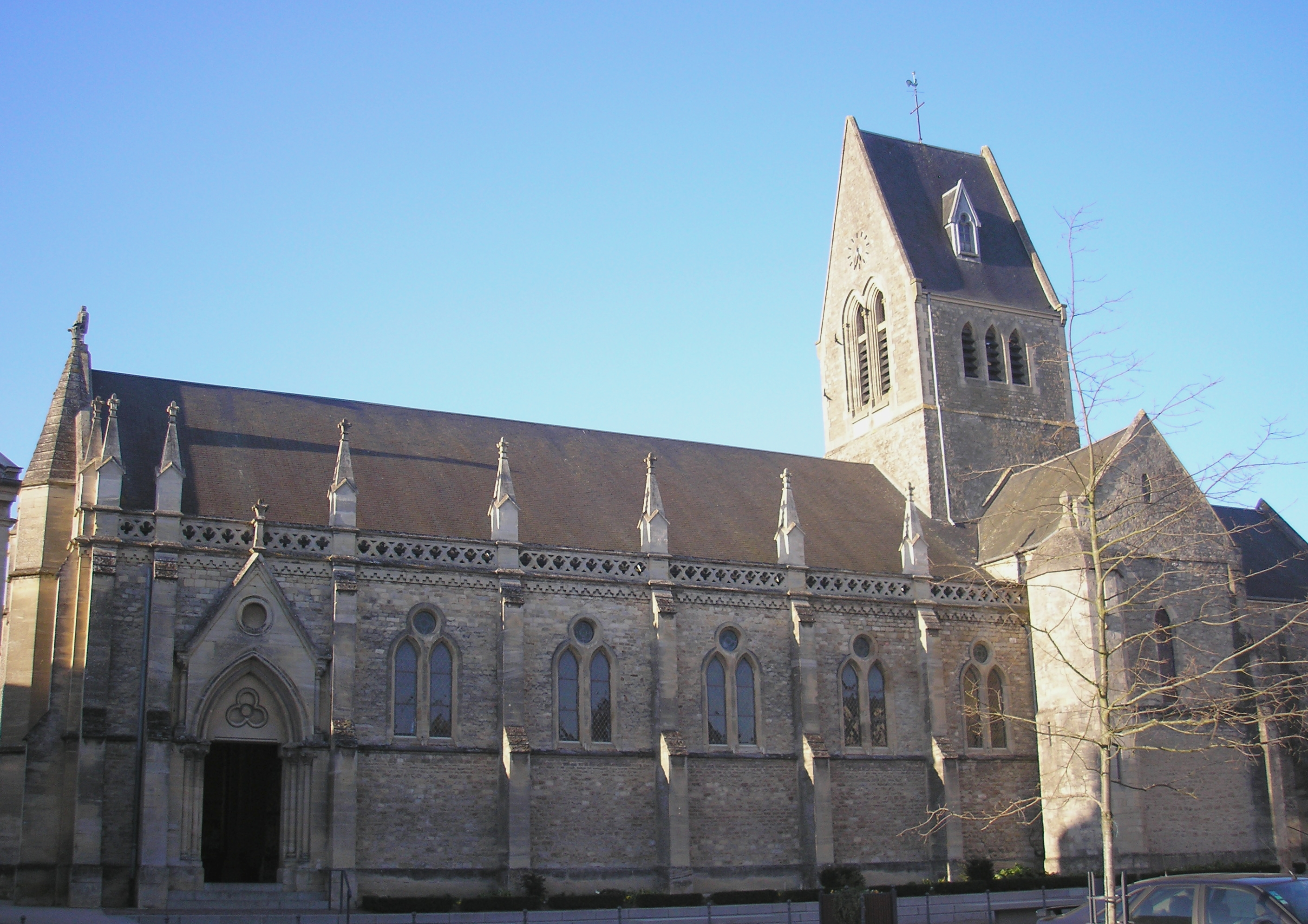 Isigny-sur-Mer (Normandie, France). L'église Saint-Georges.